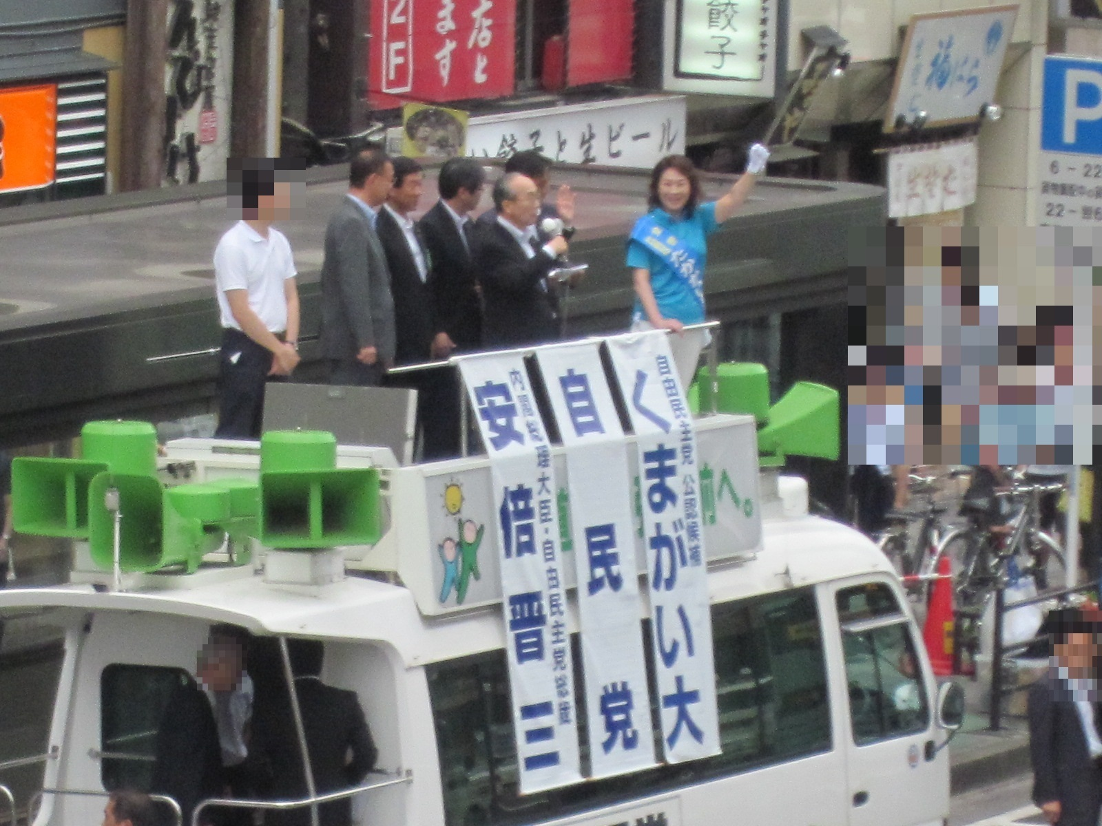 参議院選挙・高階恵美子。2016年6月25日、第24回参議院議員選挙宮城選挙区街頭演説にて。